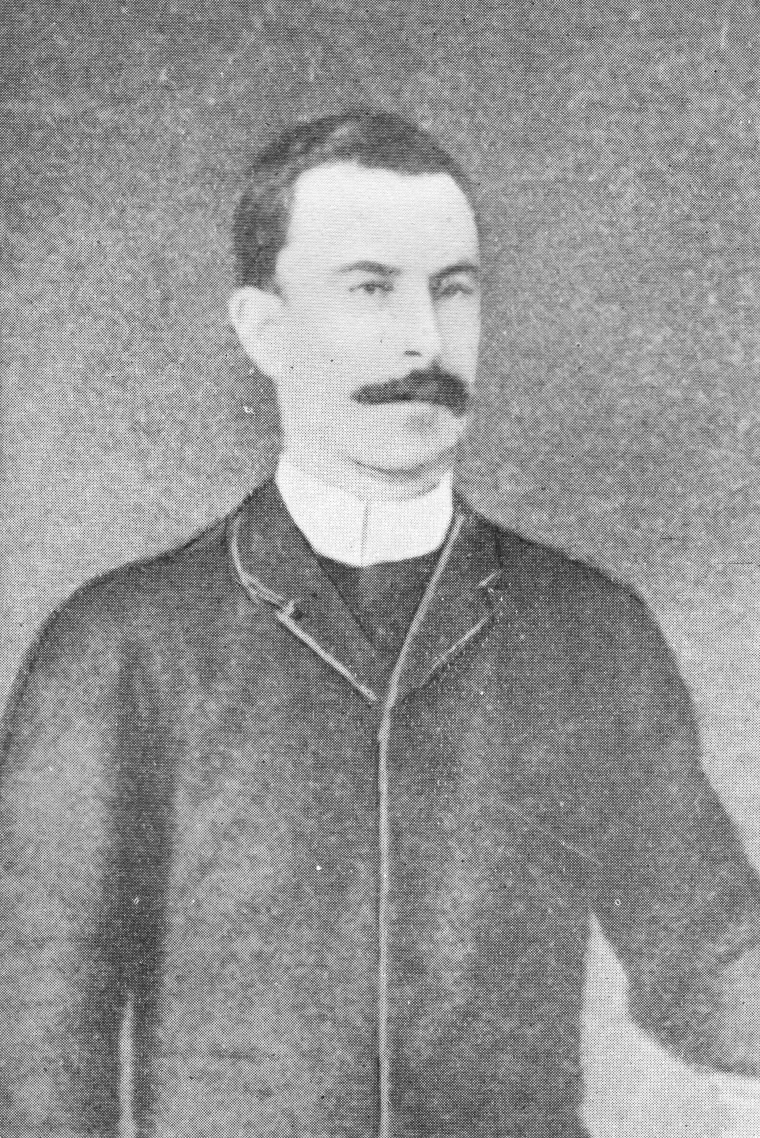 Retrato del colonizador galés John Daniel Evans.